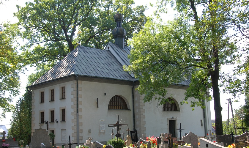 Szczepanów - kościół cmentarny pw. św. Stanisława Biskupa i Męczennika, 1781